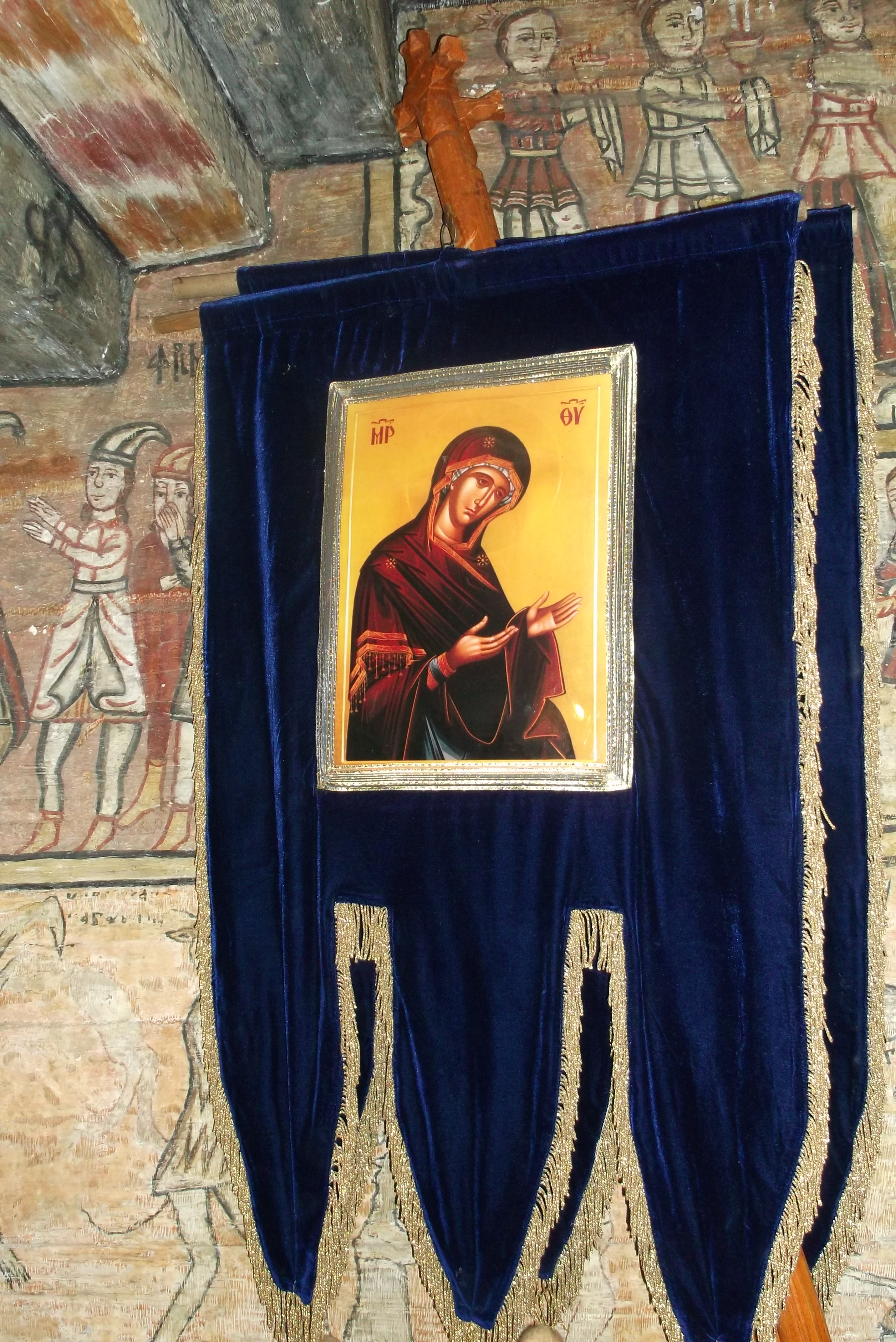 Rumunia, sztandar procesyjny w cerkwi pod wezwaniem św. Paraskewy w Deseşti